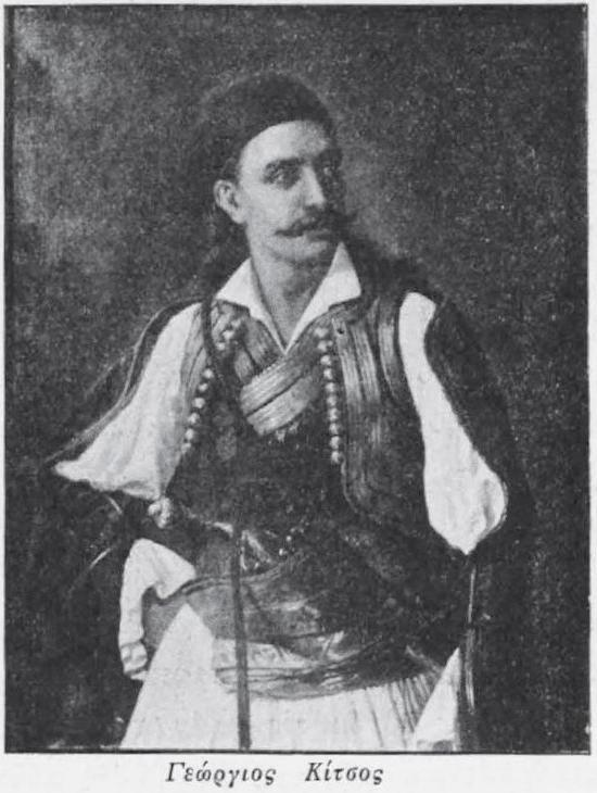 griechischer Freiheitskämpfer, 1821